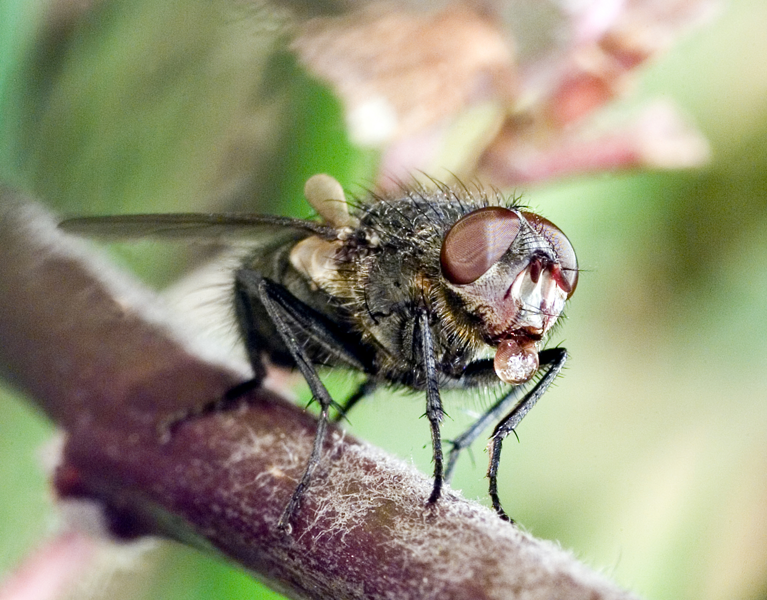 Pollenia sp. (Calliphoridae) mit Wasser-/Flüssigkeitstropfen. (originally misidenfified as Musca domestica) Technische Daten: Kodak DCS 560, Canon EF 2,8/100 Macro (@1:1), Ringblitz ML-2. Bildausschnitt vergrößert. Originalname: DCS560 00568